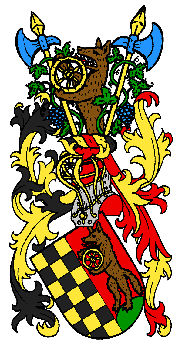 Stammwappen der von Wolffradt